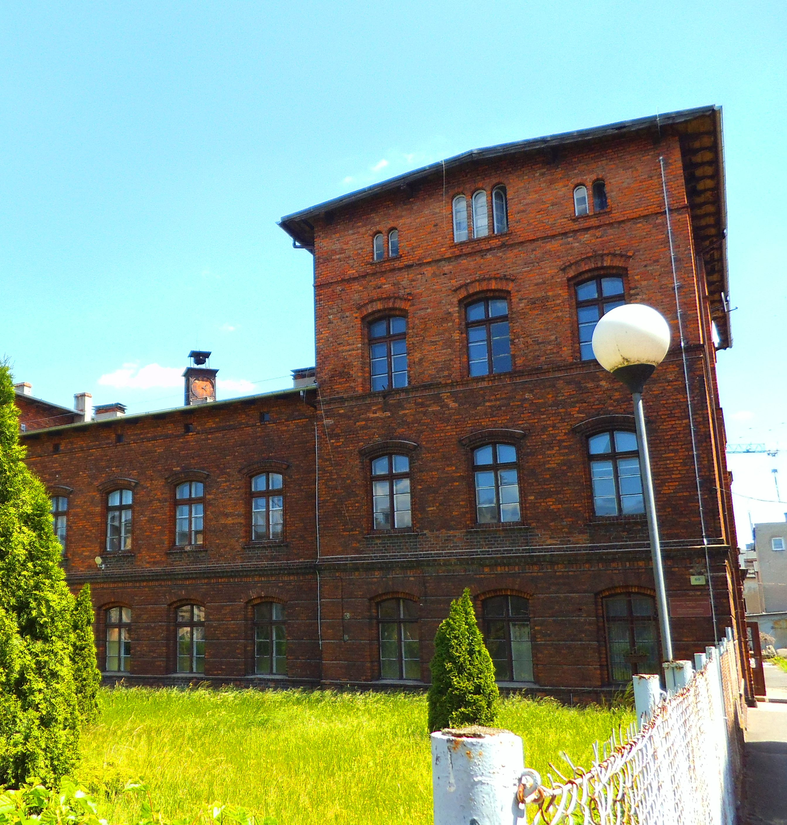 Budynek Instytutu Artystycznego UMK w Toruniu